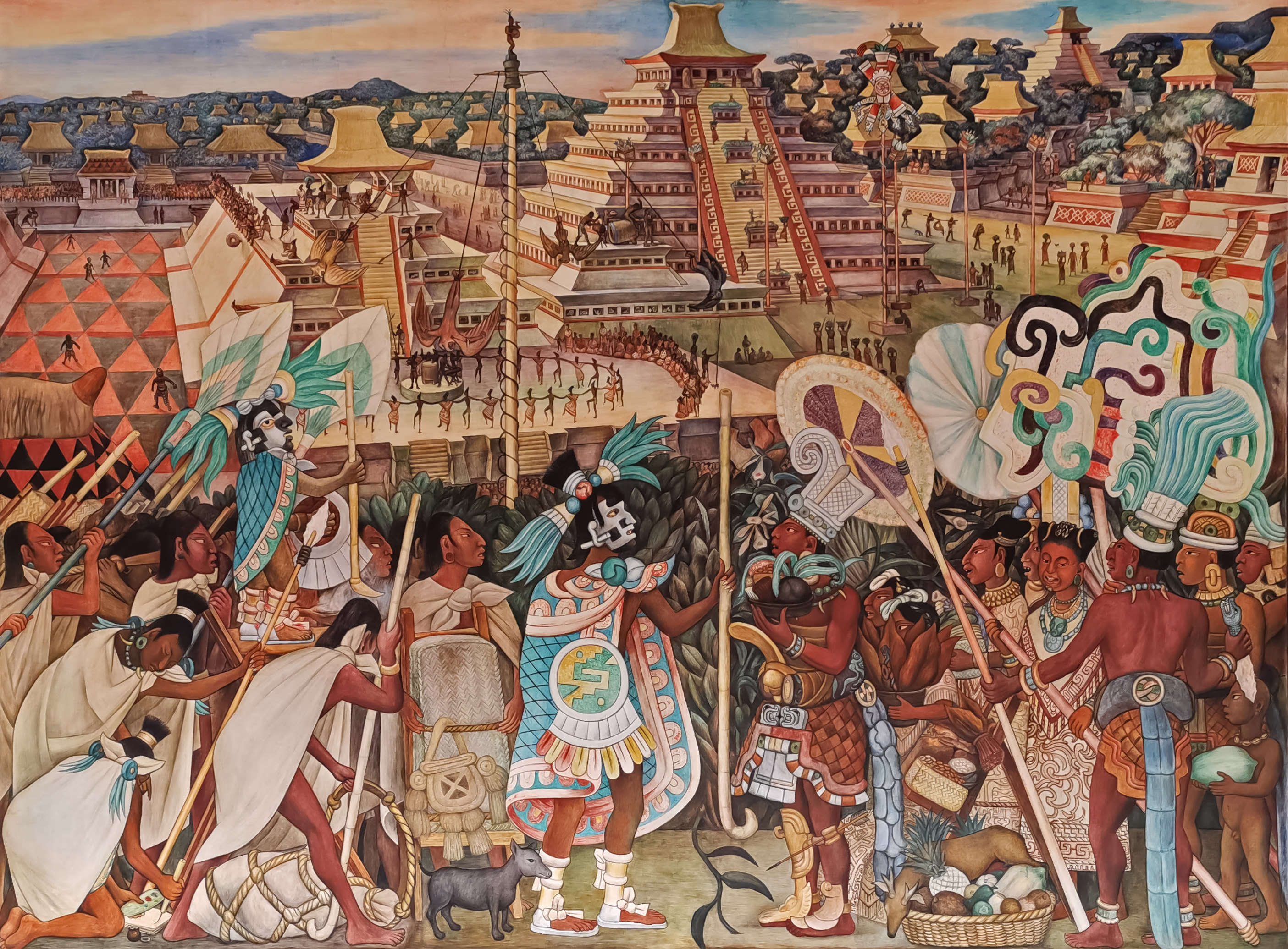 Civilización Totonaca Diego Rivera Palacio Nacional 2019